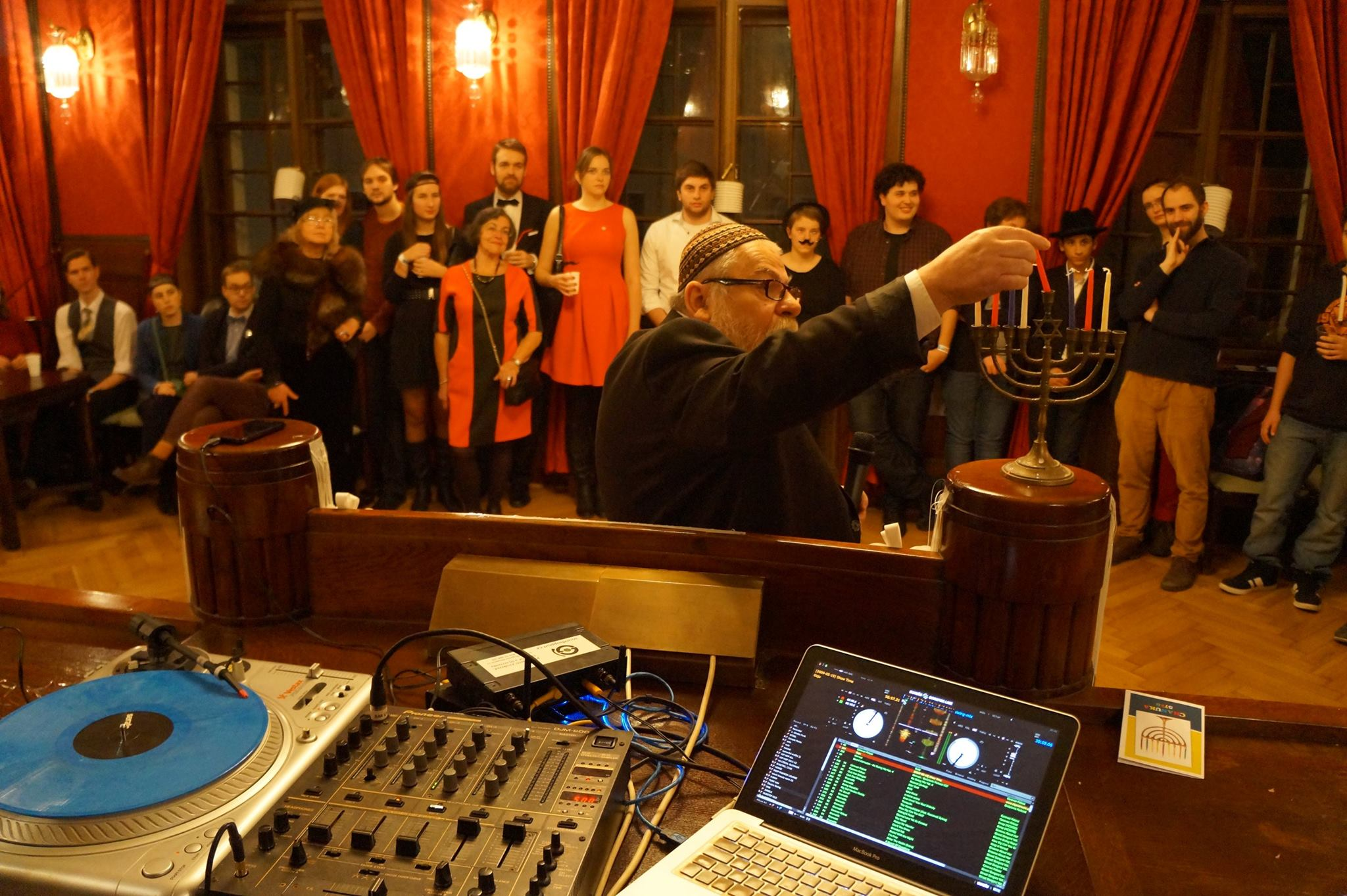 Česká unie židovské mládeže slaví svátek Chanuka společně s Vrchním rabínem Karolem Sidonem.